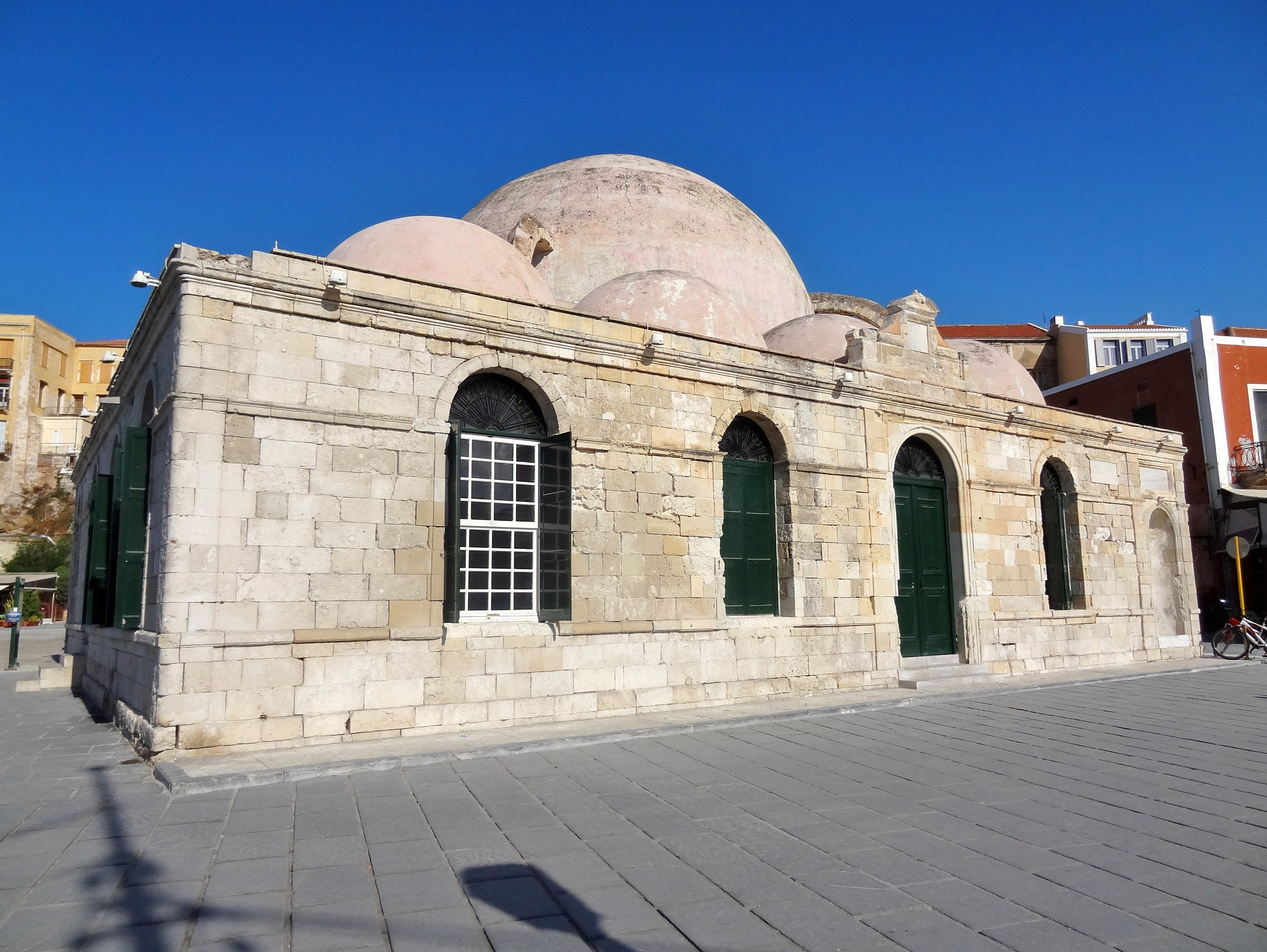 Hassan-Pascha-Moschee am Hafen von Chania, Gemeinde Chania, Regionalbezirk Chania, Kreta, Griechenland